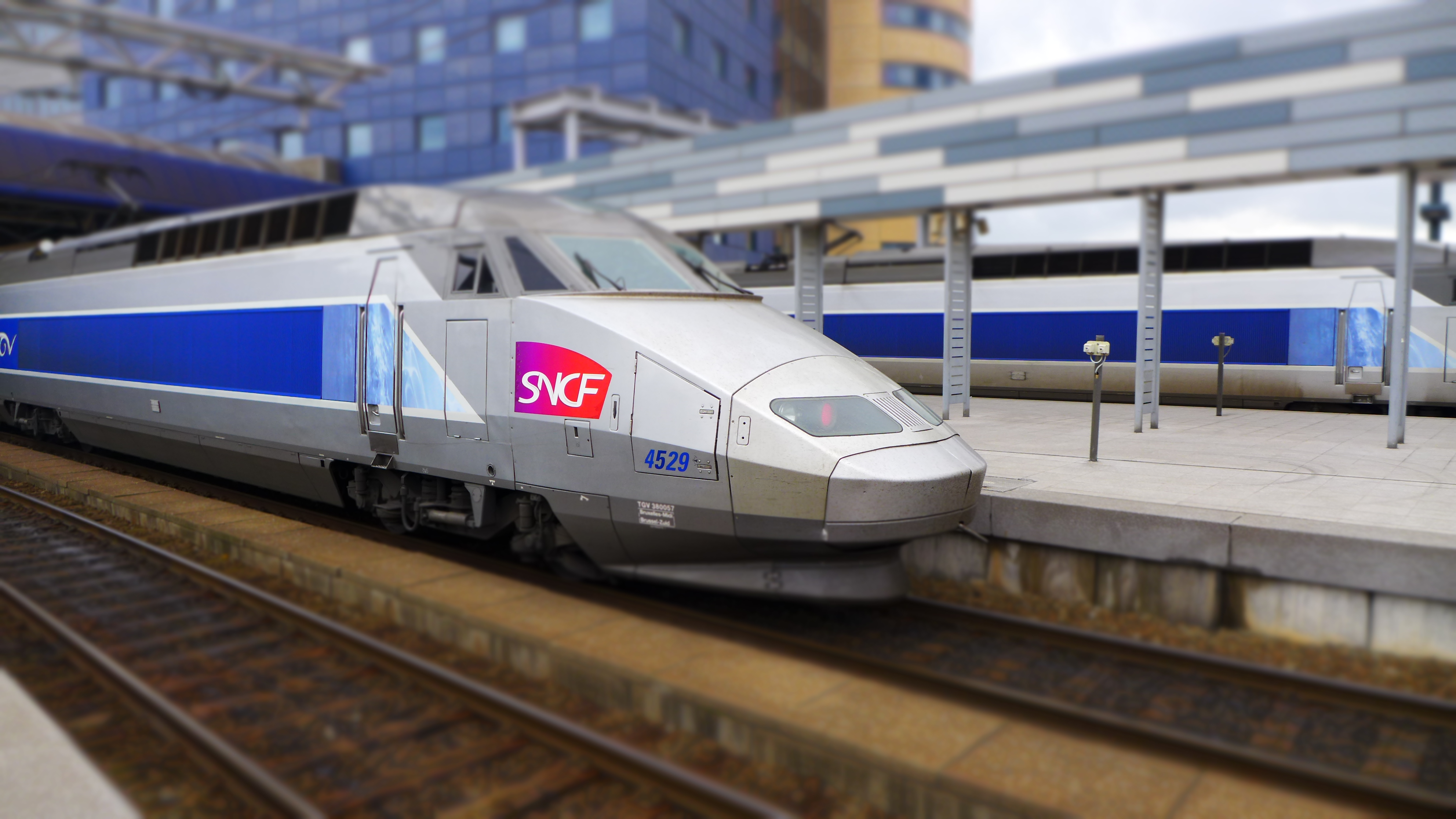 TGV at Brussels Midi